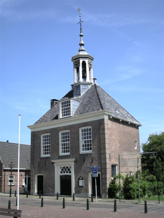 Waaggebouw in Kuinre